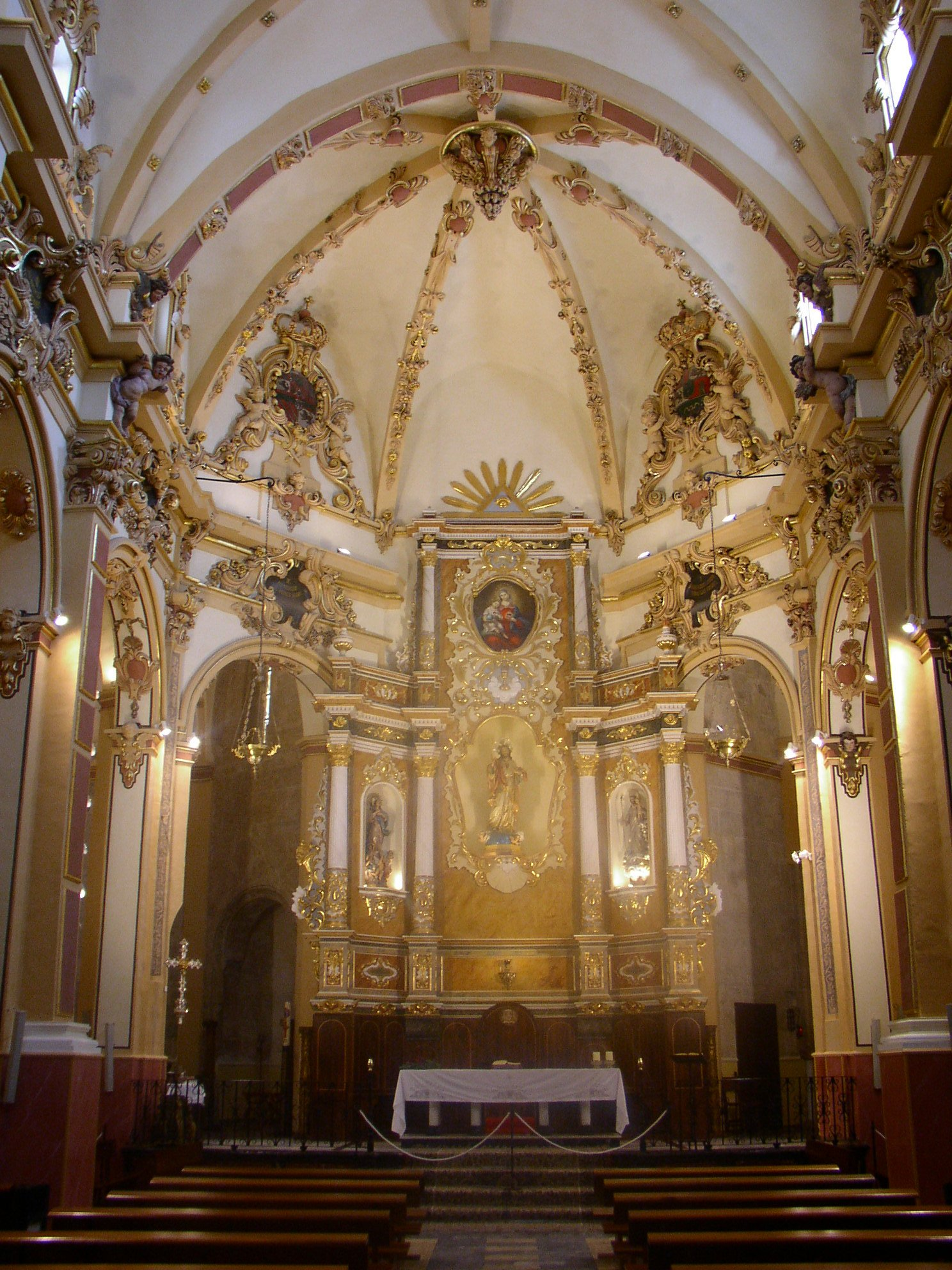 Requena és un municipi valencià a la comarca de la Plana d'Utiel. Esglèssia del Salvador.